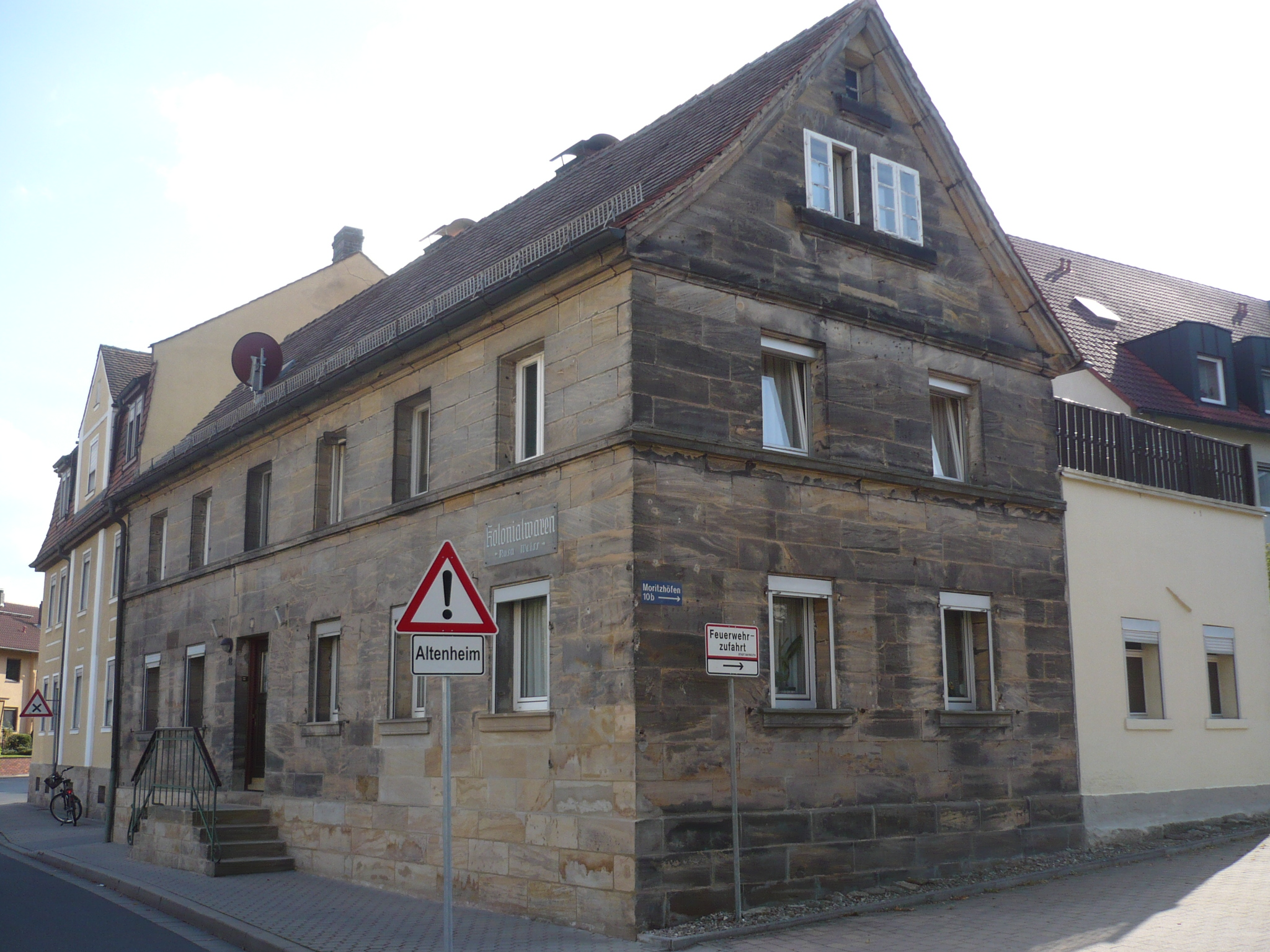 Moritzhöfen 12 Bayreuth